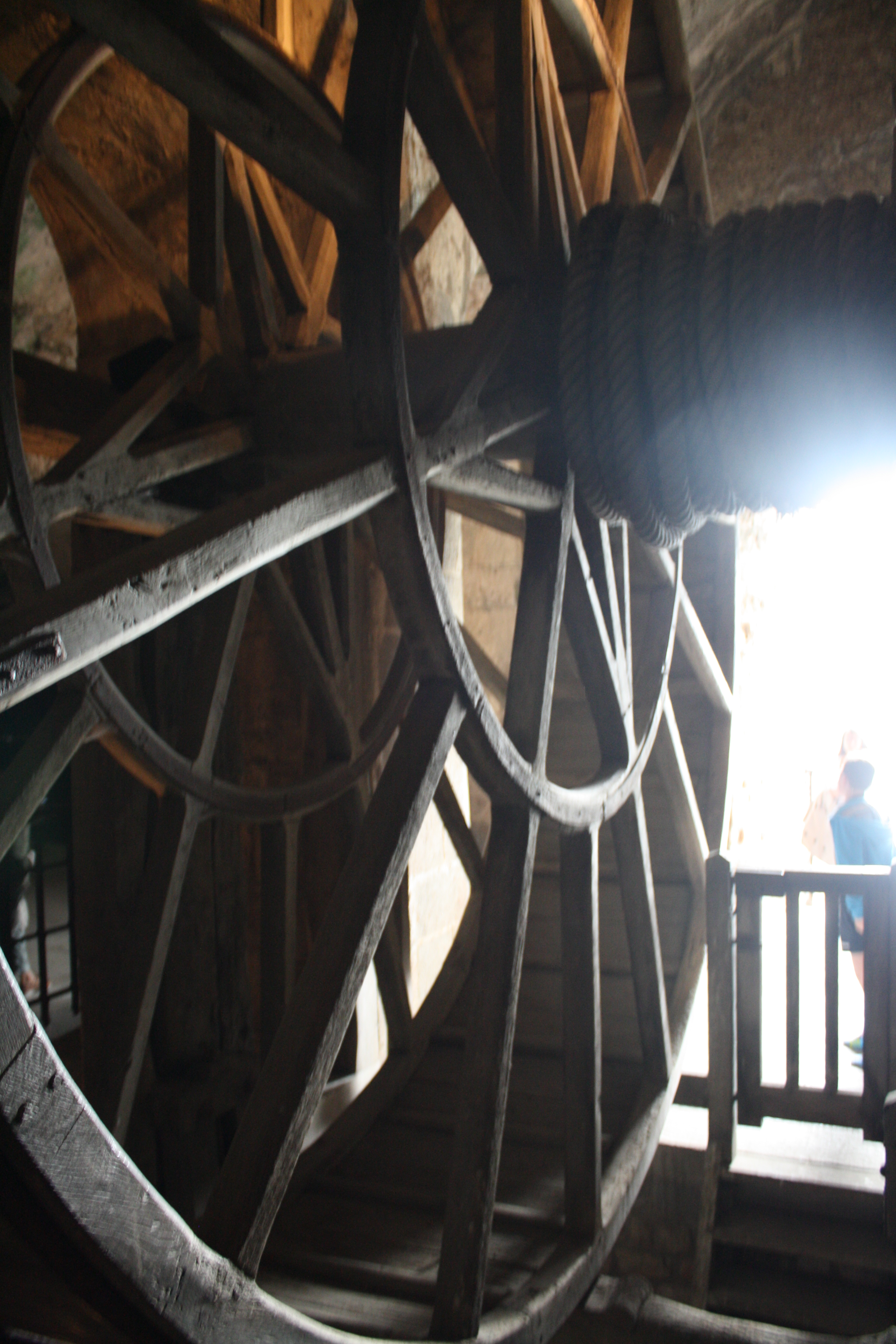 Abbaye du Mont-Saint-Michel. Tympan de la grue.